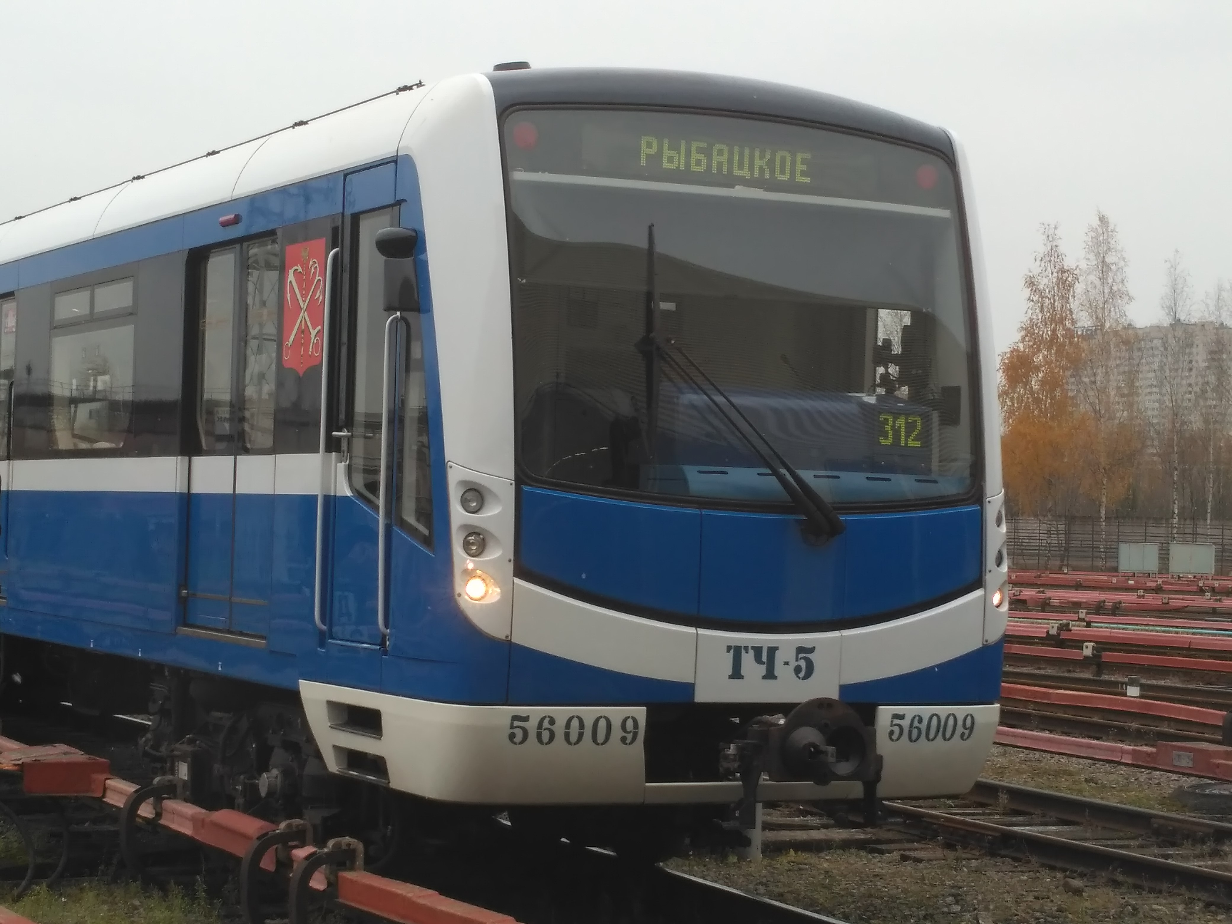 Поезд метро НеВа в электродепо Невское